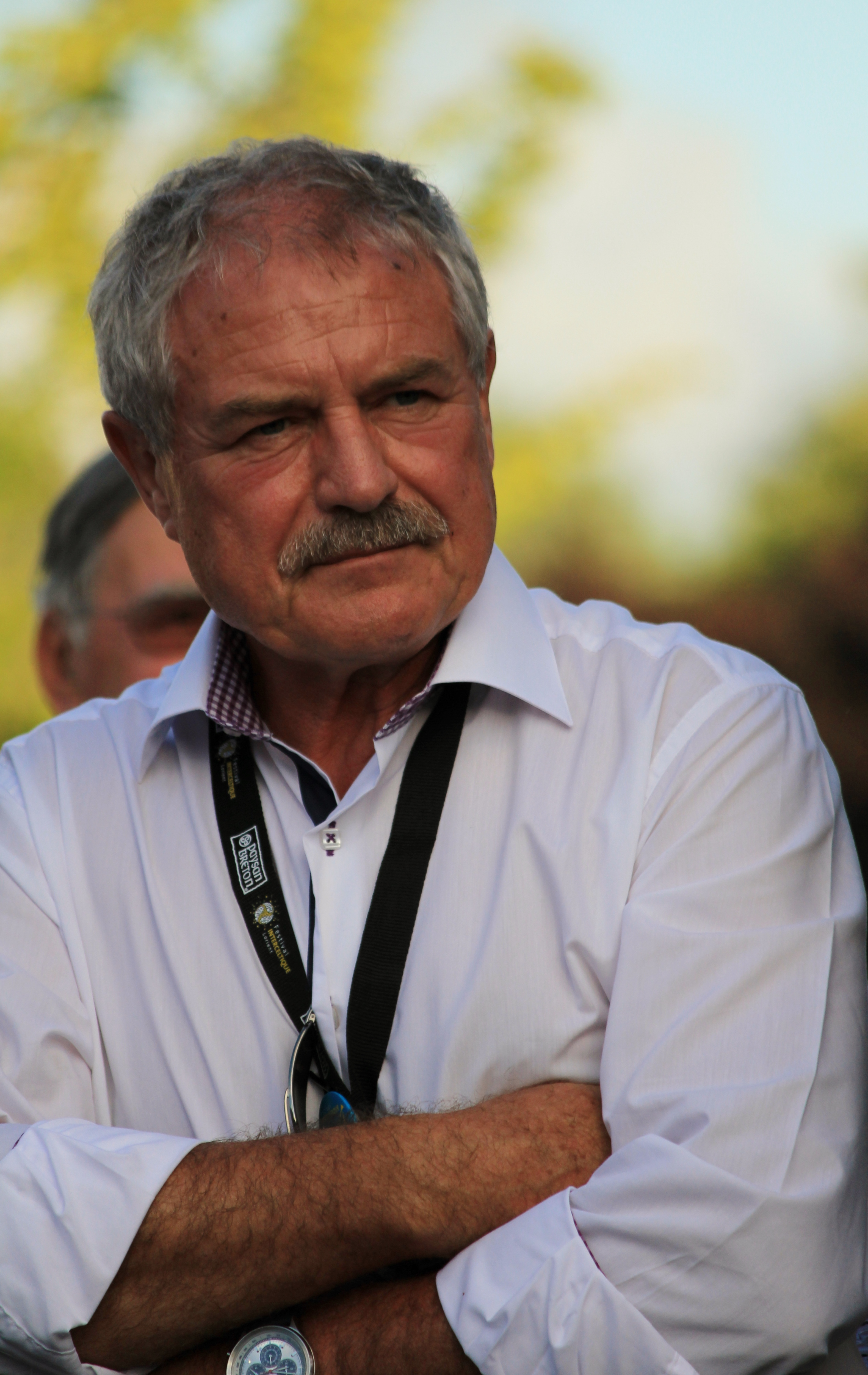 Norbert Métairie lors de la remise des trophées du championnat national des bagadoù 2013